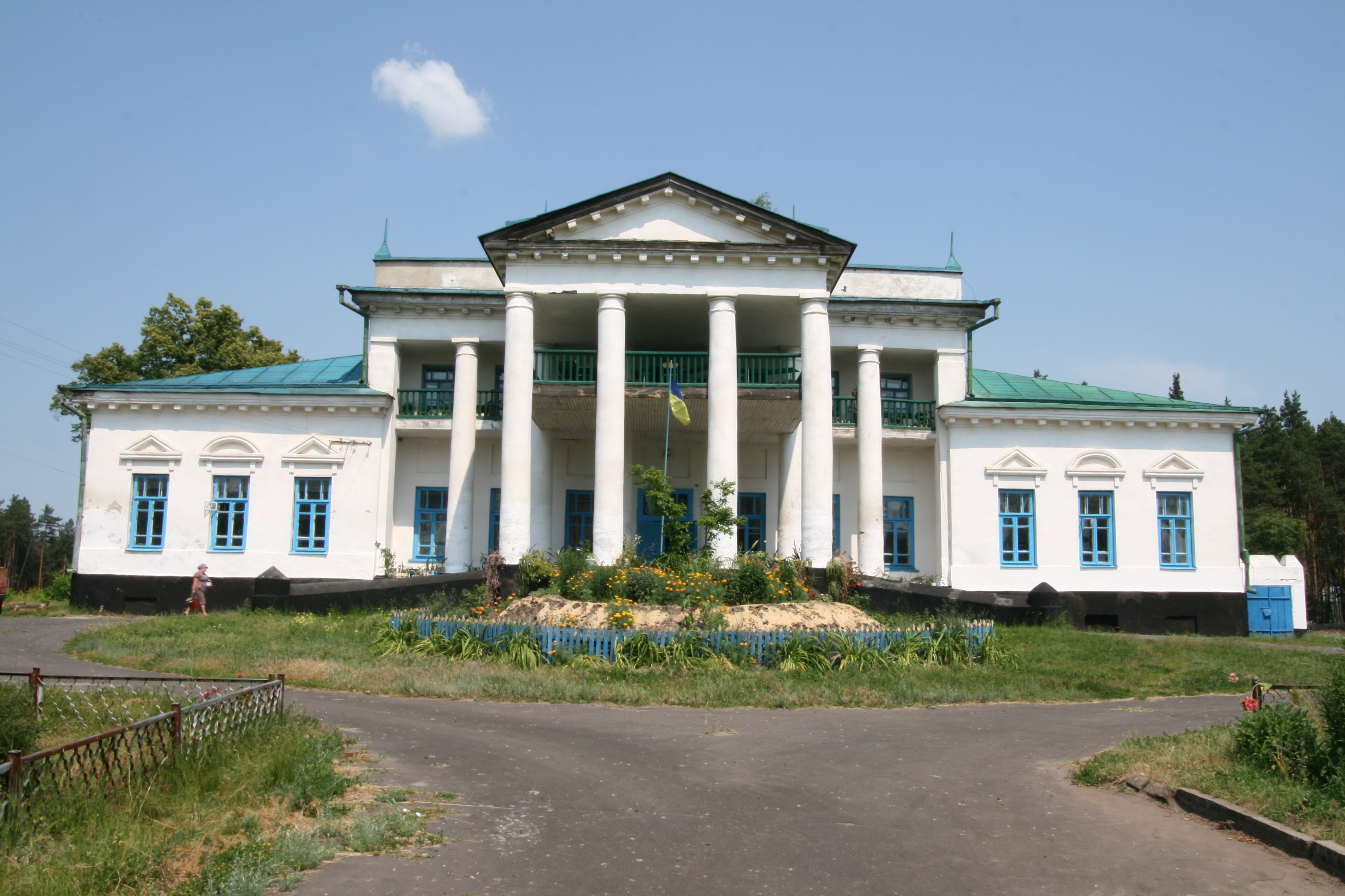 Садибний будинок (мур.), с.Бобрик